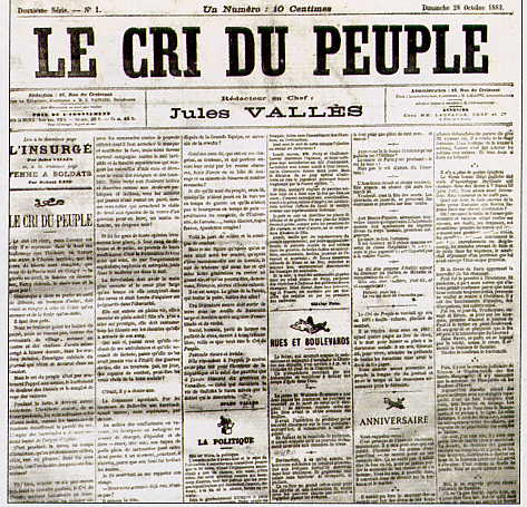 Front page of an issue of "Le Cri du Peuple" (founder Jules Vallès, 1871)